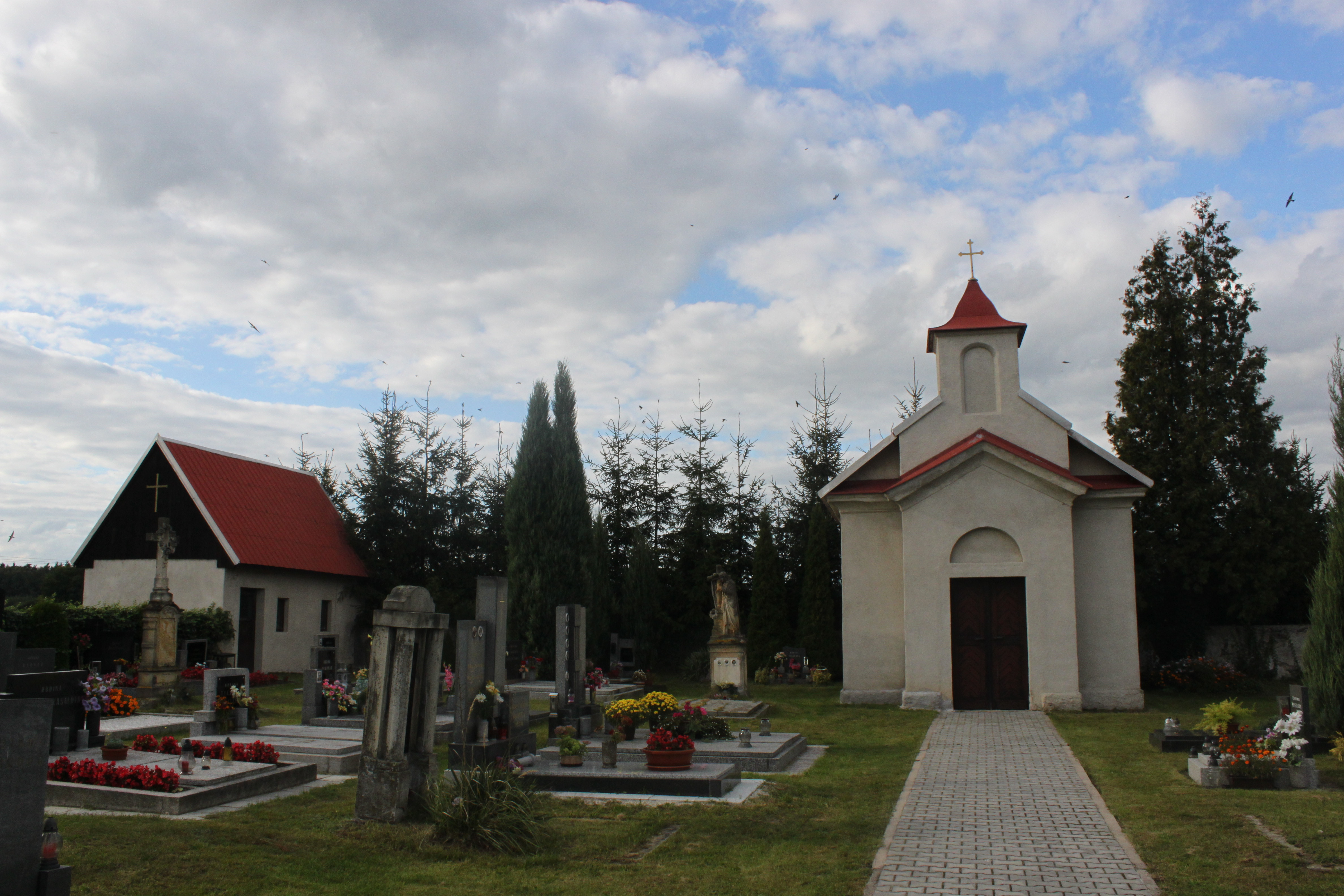 Hřbitov a hřbitovní kaple v obci Labské Chrčice